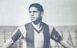 Rinaldo Martino in San Lorenzo kit.